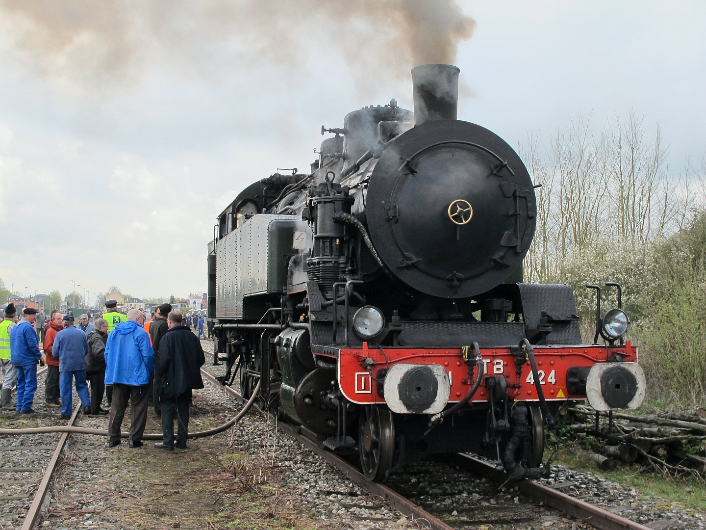 La locomotive 141 TB 424 de la SNCF, en gare de Noyelles sur le chemin de fer de la baie de Somme le 16 avril 2016.